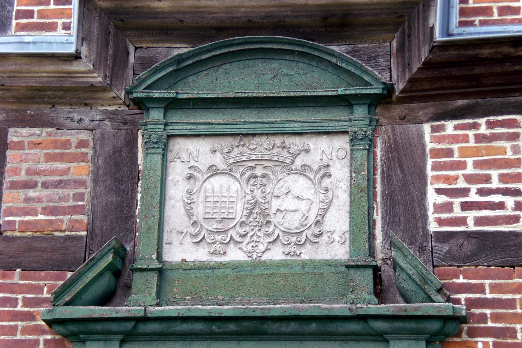 (Altes) Herrenhaus Schwiessel (Mecklenburg-Vorpommern) - Allianzwappen: v. Plessen/v. Levetzow Datum: 13.08.2010 Urheber: onnola (Flickr-User) Quelle